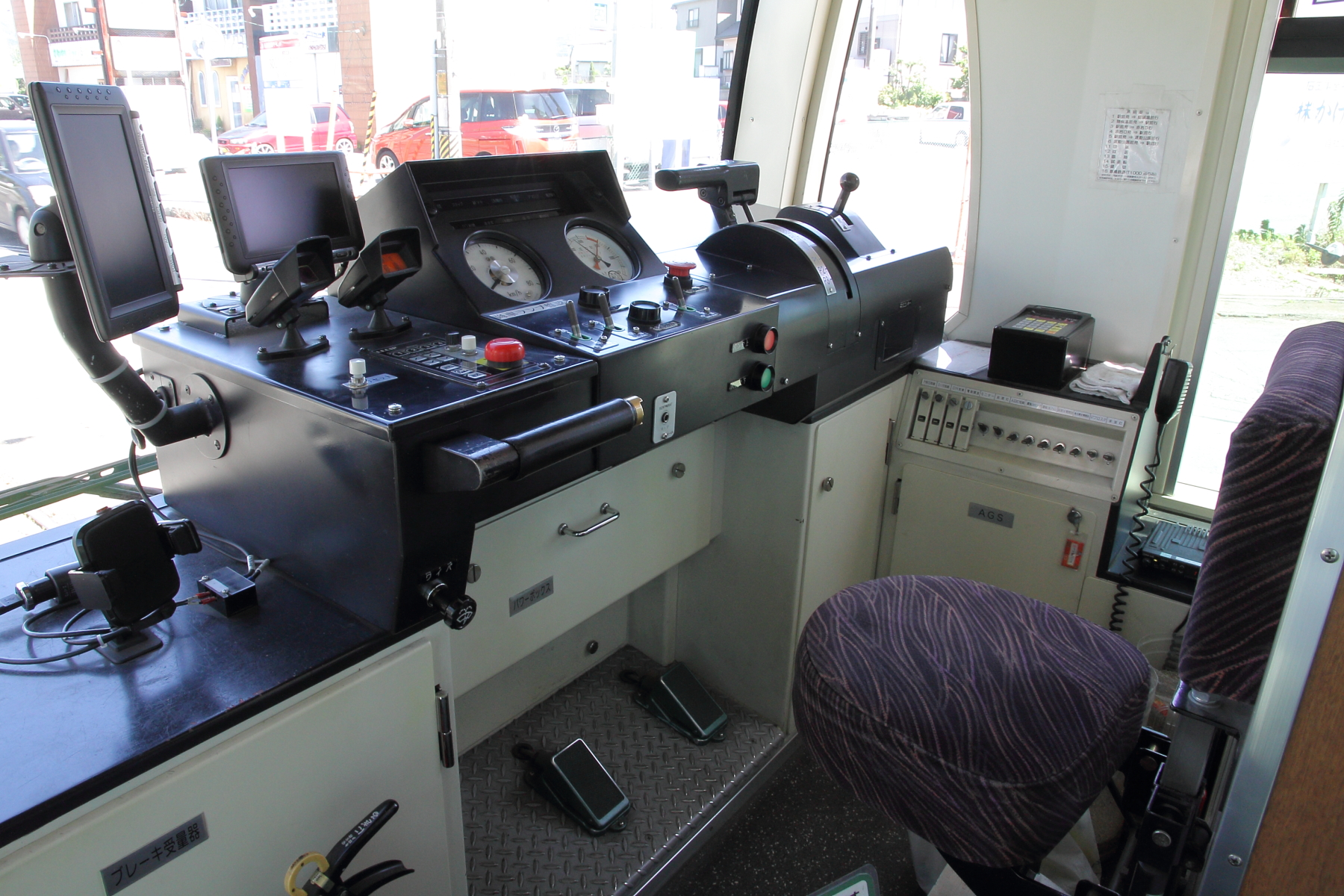 豊橋鉄道T1000形 (T1001) の運転台